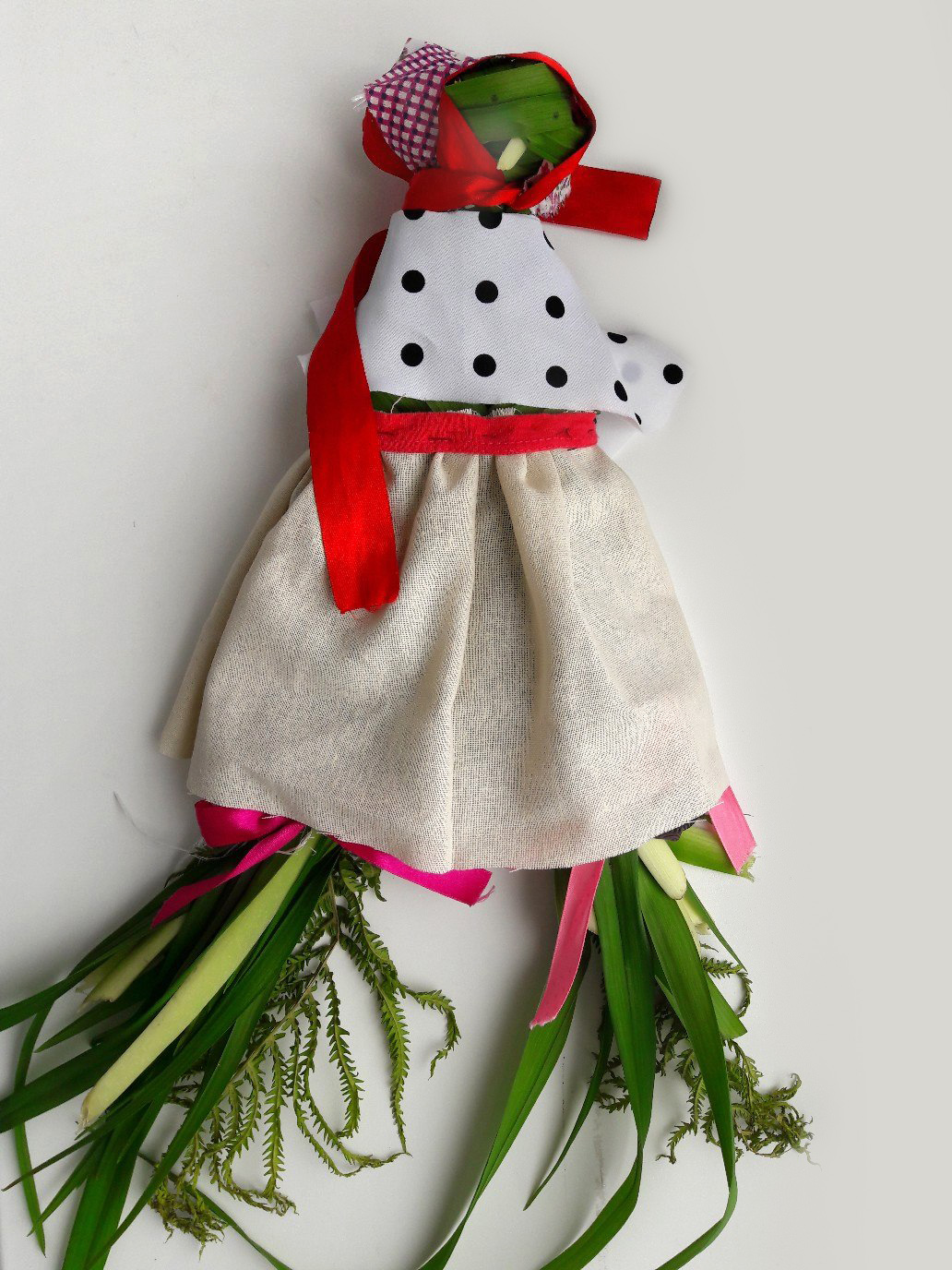 «Кукушка». Обрядовая кукла обряда троицкого кумления села Шелаево Валуйского района Белгородской области.